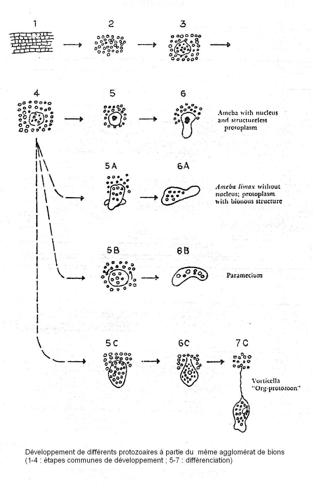 Processus Bioneux